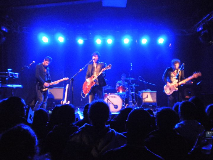 La Fame di Camilla in concerto.